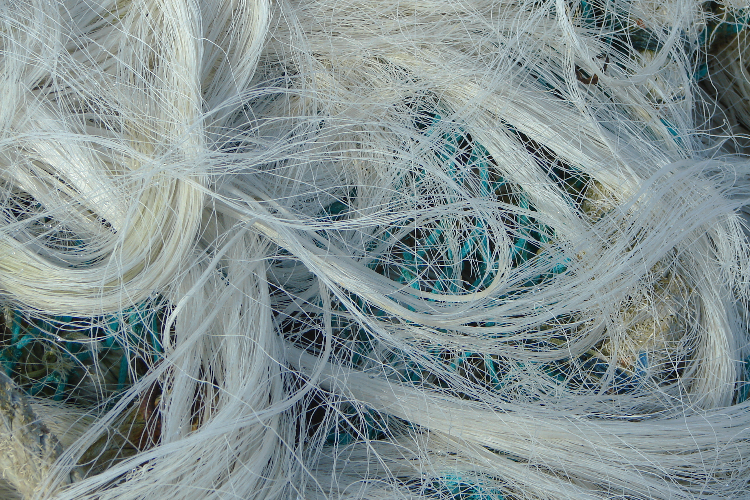 Lieu : Courseulles sur Mer (Normandie/France) - port Cordages et filets de pêche